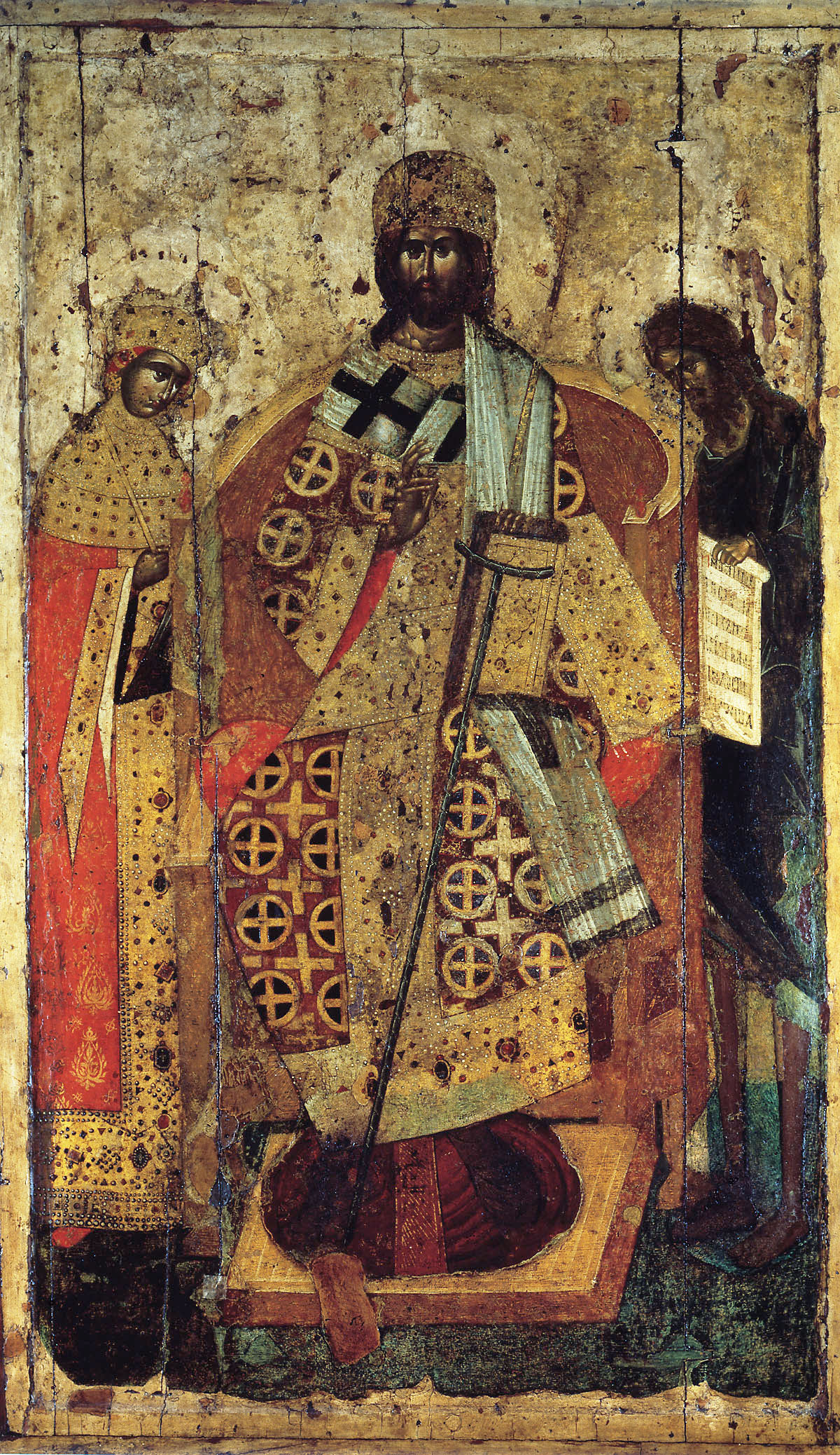 "Предста Царица" (икона к. XIV века, Успенский cобор Московского Кремля)